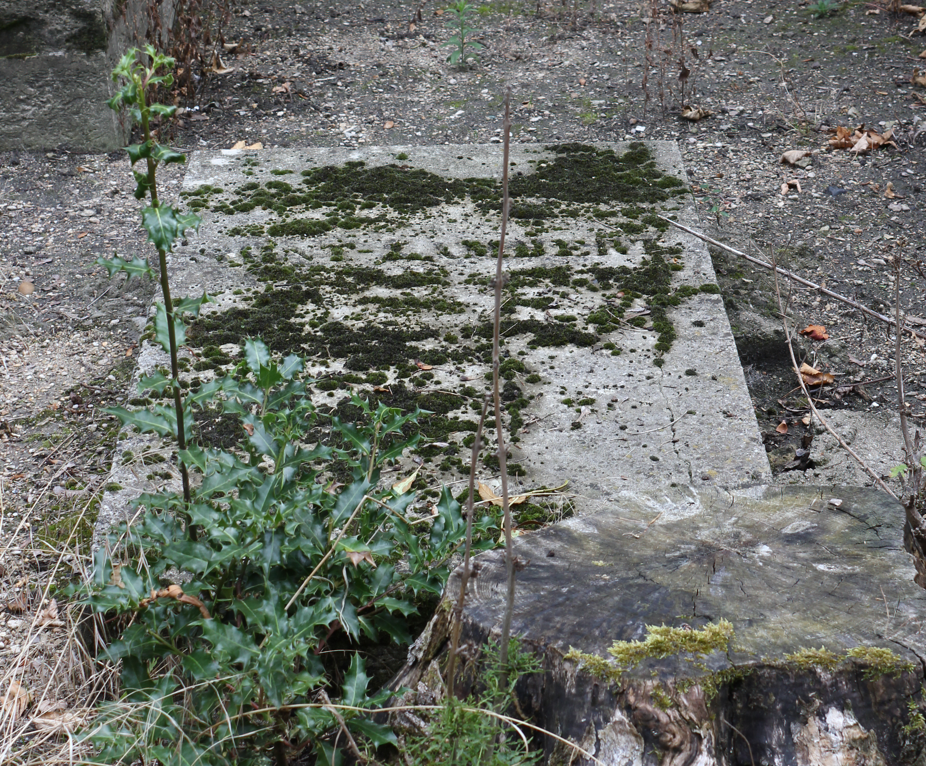 Sépulture de Jean-François de Saint-Lambert (1713-1803). Préalablement inhumé cimetière de Montmartre, sa dépouille est transférée au Père-Lachaise en 1843.